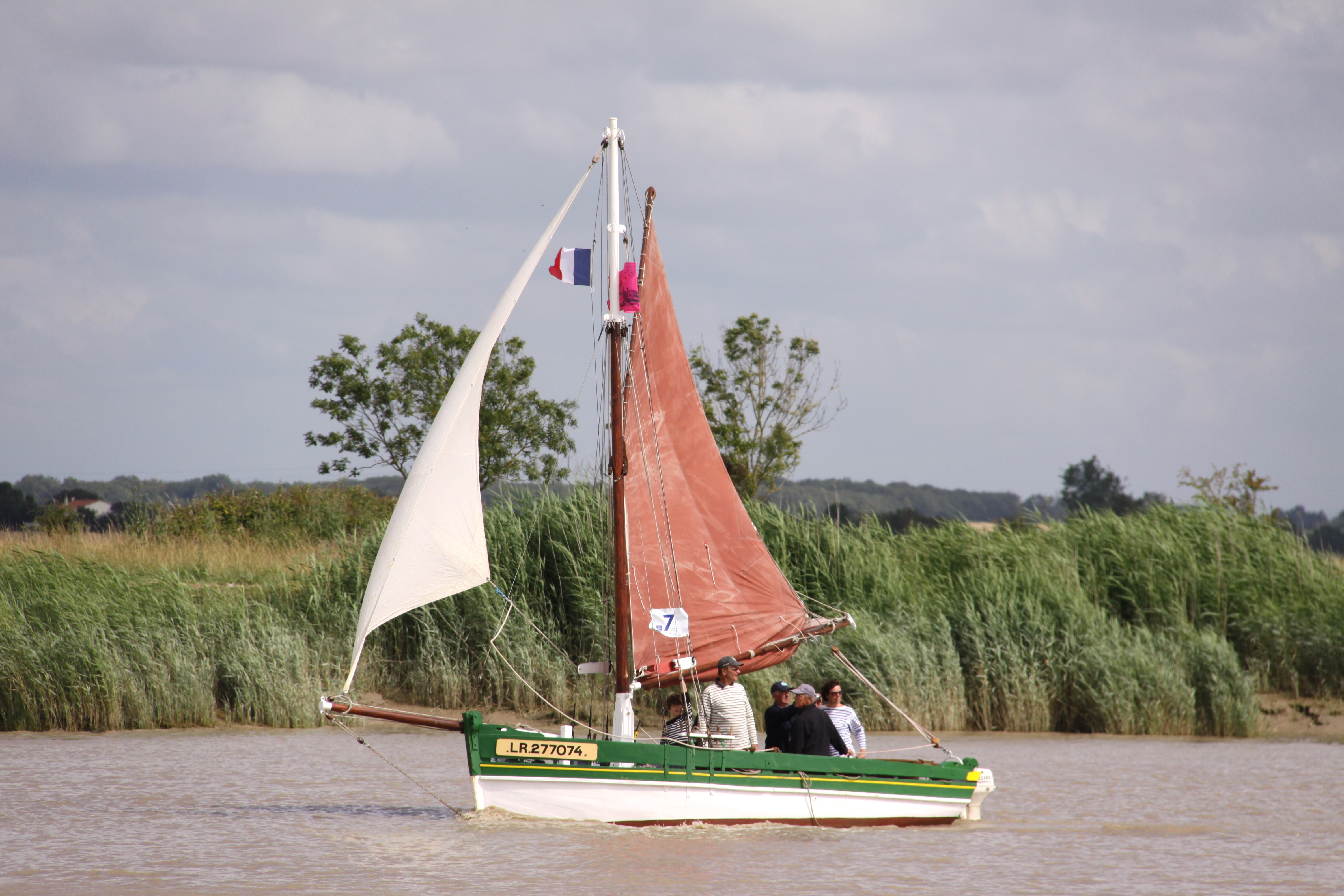 Le cotre de pêche « FREPAT » participant à la parade nautique sur le Charente à Rochefort-sur-Mer, en l’ honneur de la mise à l’eau de la frégate « L’hermione » le vendredi 6 juillet 2012. Ce bateau de pêche a été construit aux Sables d’ Olonnes en 1942. Il a été utilisé pour pêcher des poissons et draguer des coquillages. Immatriculation: LR 277074. Rochefort-sur-Mer, Charente Maritime, France.